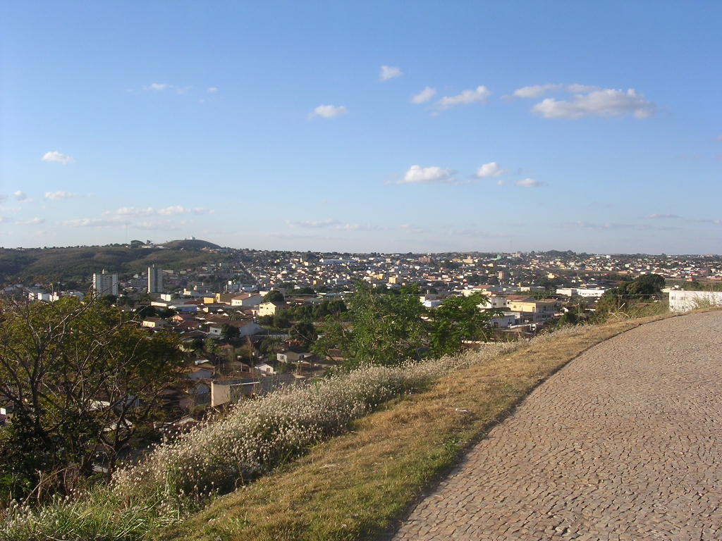 Vista de Catalão, em Goiás (Brasil), a partir do Centro Cultural, no morro das Três Cruzes.